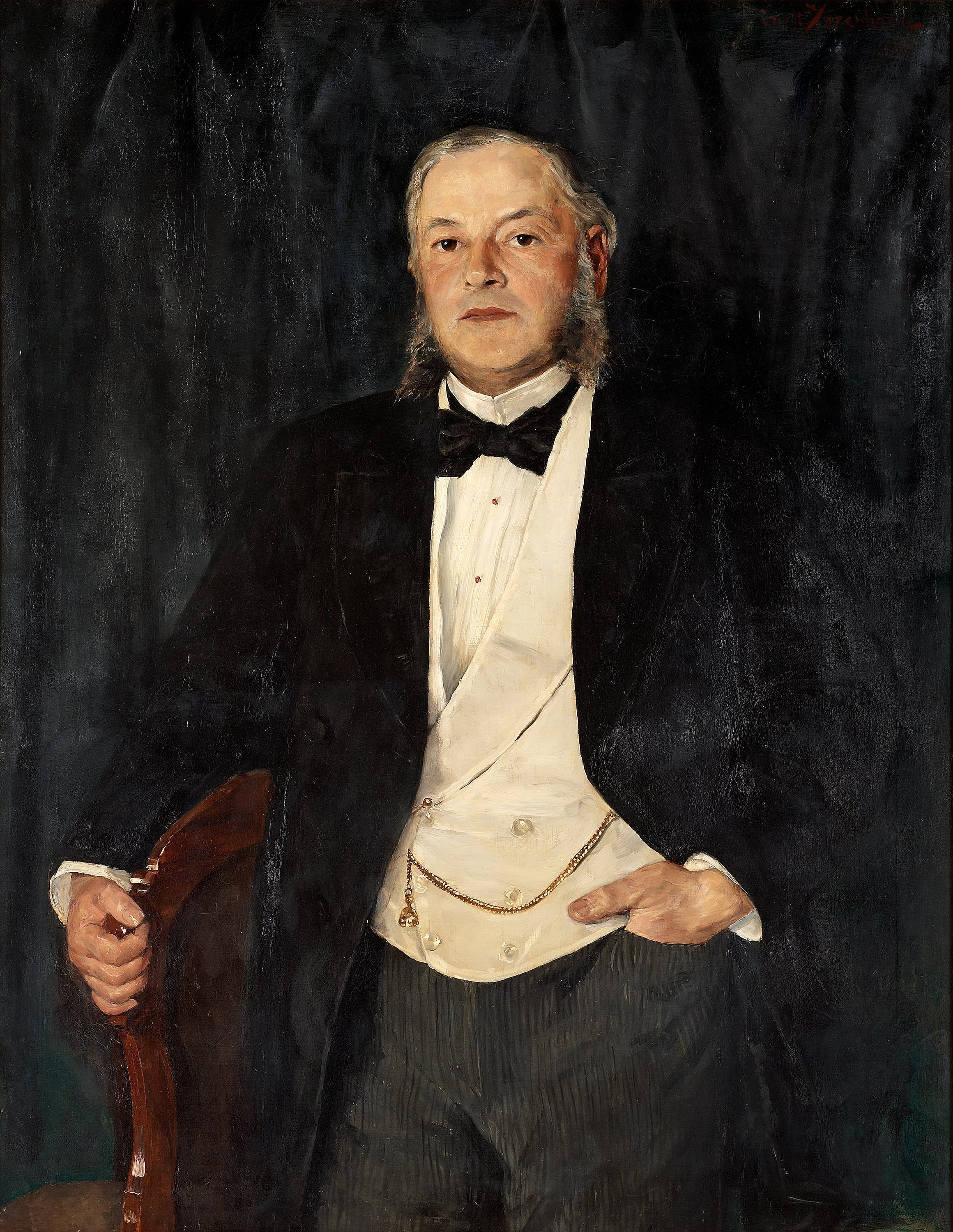 Porträtt av herr Eduard Josephson, konstnärens farbroder